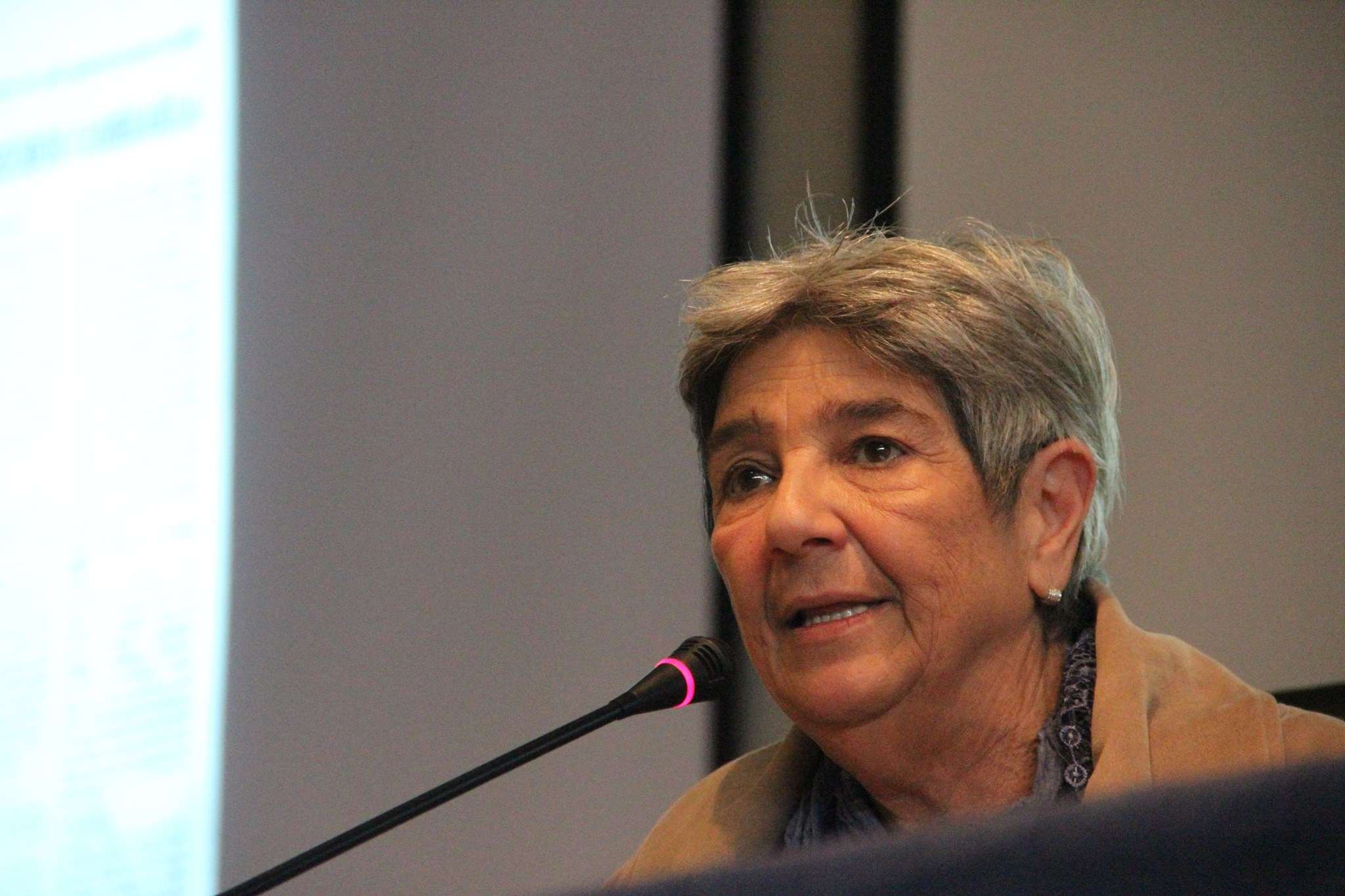 Feminista uruguaya Lilián Celiberti en el marco del Encuentro de Feministas Desorganizadas (9/9/2017)